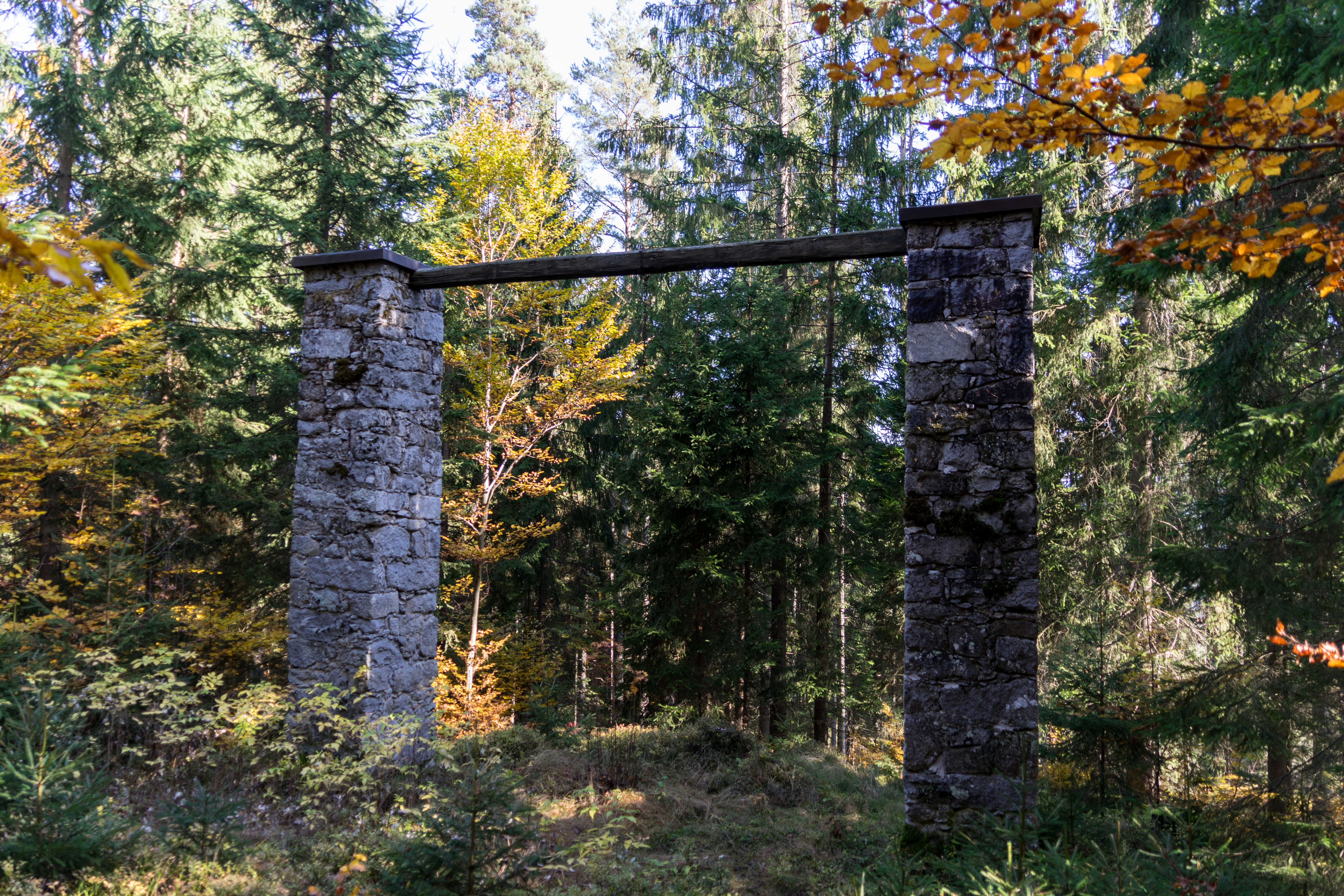 Weitersfeldner Galgen, südlich von Weitersfelden im Mühlviertel in Oberösterreich. Eine Rekonstruktion am originalen Standort. Nun im Wald.